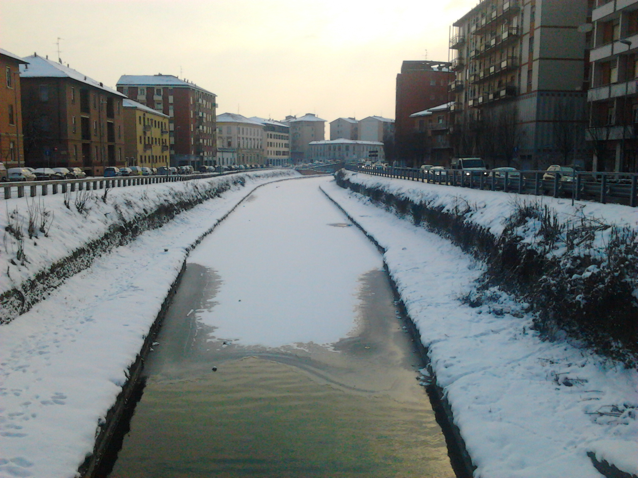 Naviglio pavese gelato a Pavia